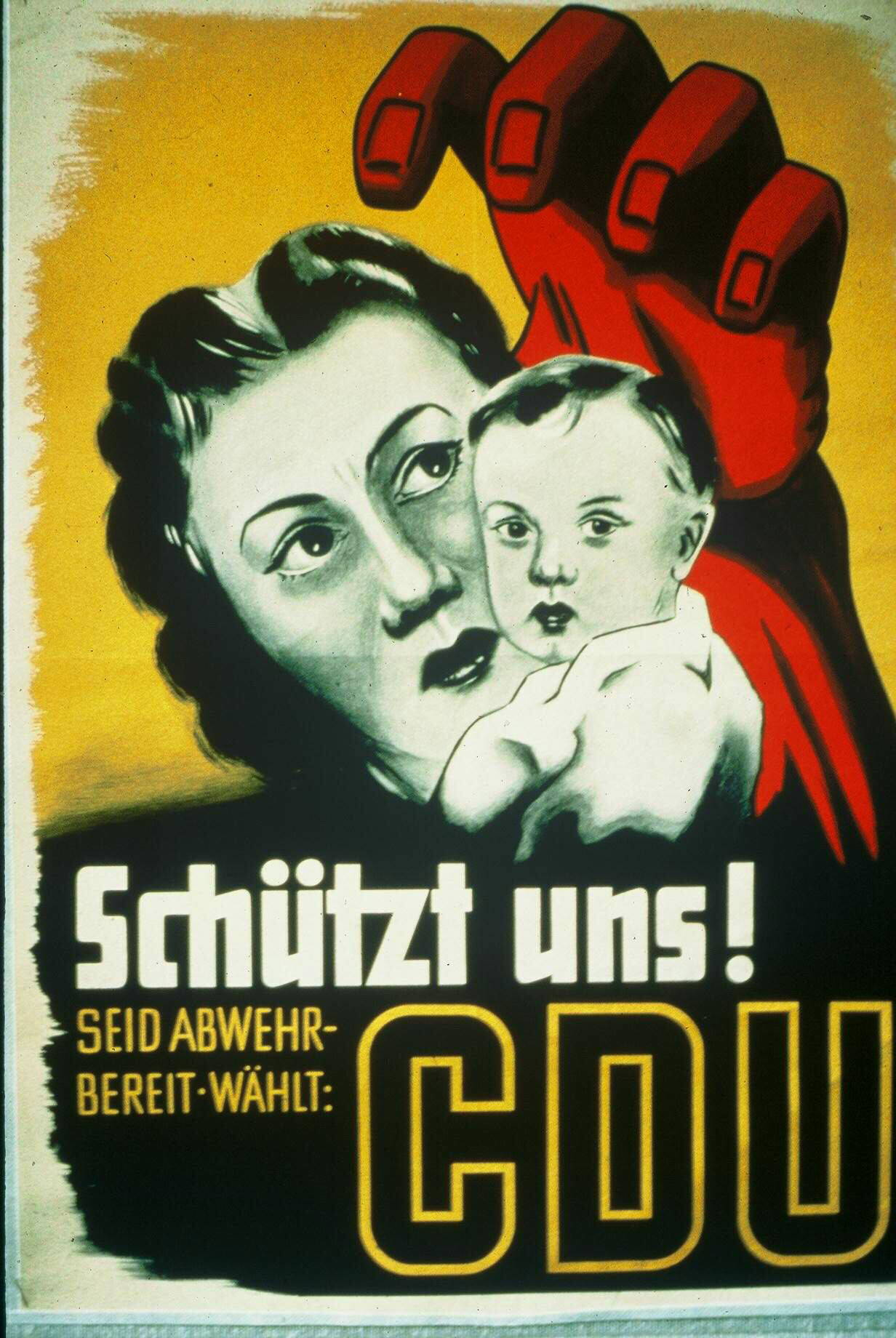 Schützt uns! Seid abwehrbereit - Wählt: CDUAbbildung:Mutter mit Kind, rote HandKommentar:Kalter KriegPlakatart:Motiv-/TextplakatObjekt-Signatur:10-001: 414Bestand:Plakate zu Bundestagswahlen (10-001)GliederungBestand10-18:Plakate zu Bundestagswahlen (10-001) » Die 2. Bundestagswahl am 6. September 1953 » MotivplakateLizenz:KAS/ACDP 10-001: 414 CC-BY-SA 3.0 DE